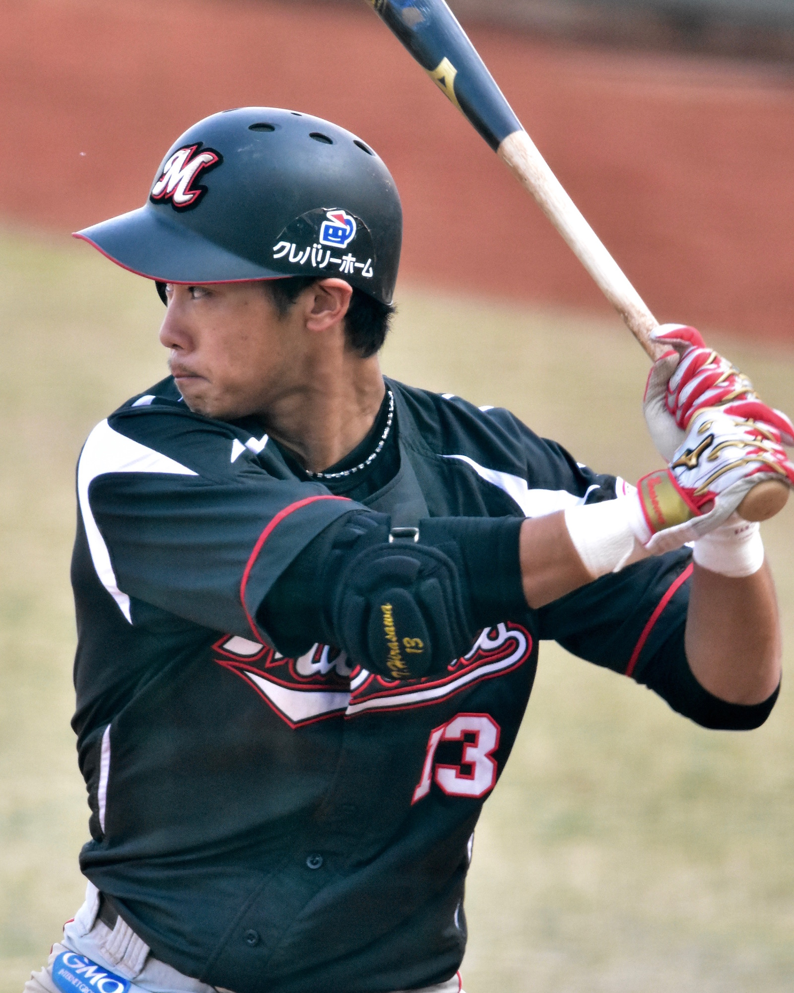 2016年12月17日台中インターコンチネンタル野球場にて